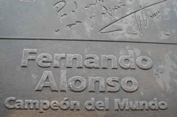 Placa conmemorativa a Fernando Alonso en el Circuit de Catalunya.